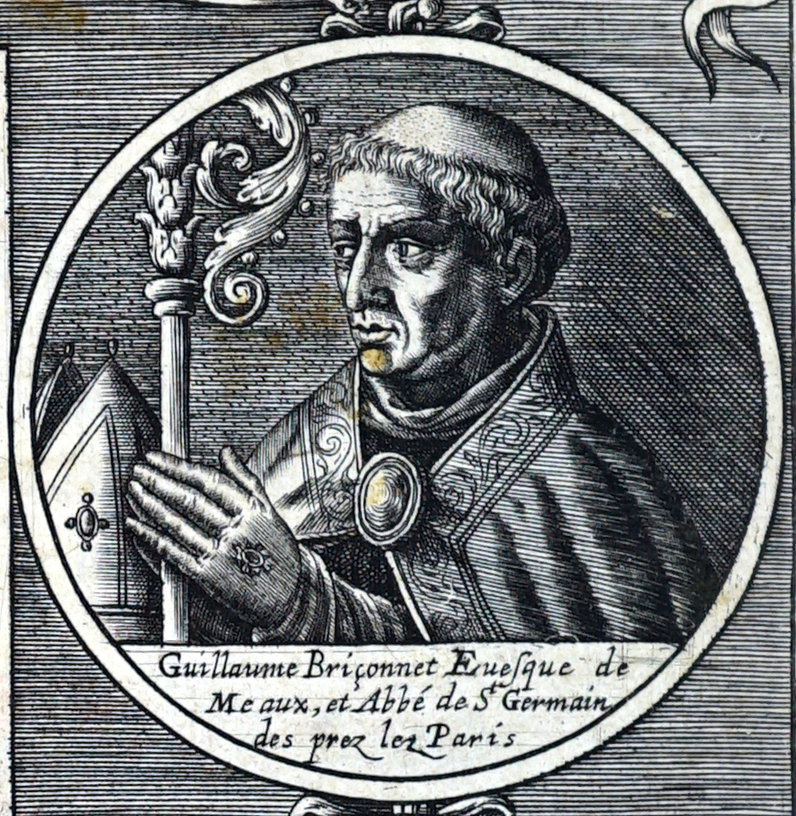 du livre de Guy Bretonneau.